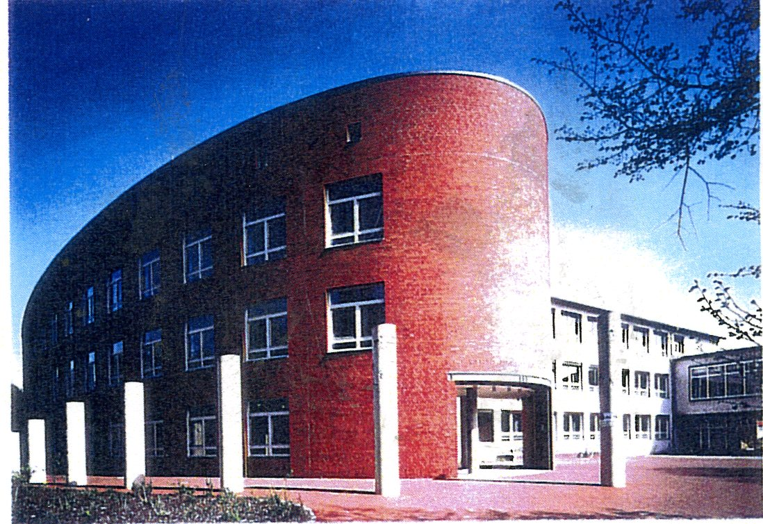 Nordfassade/ Haupteingang